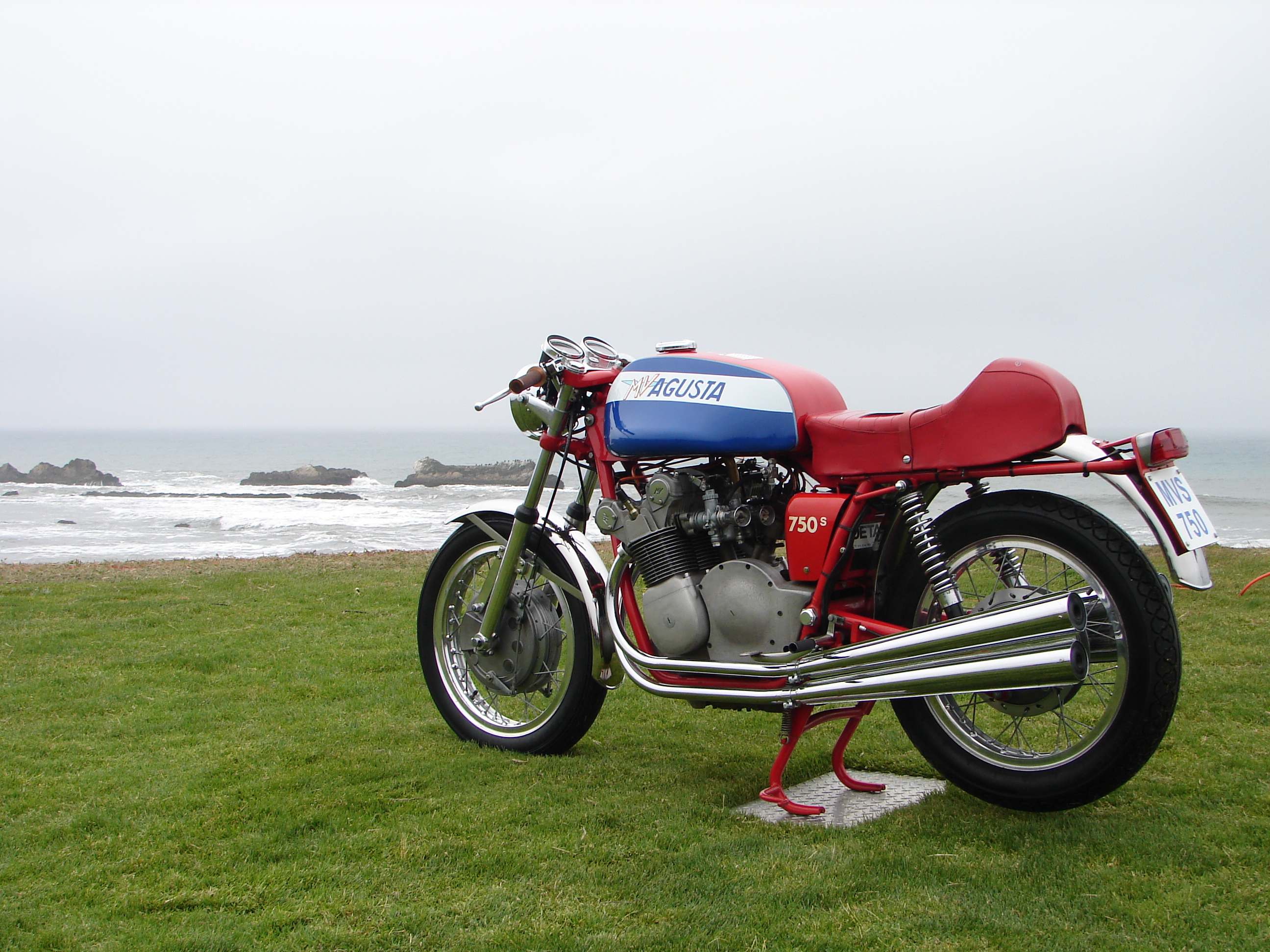 MV Agusta 750 Sport "tamburo" (1970-1973)